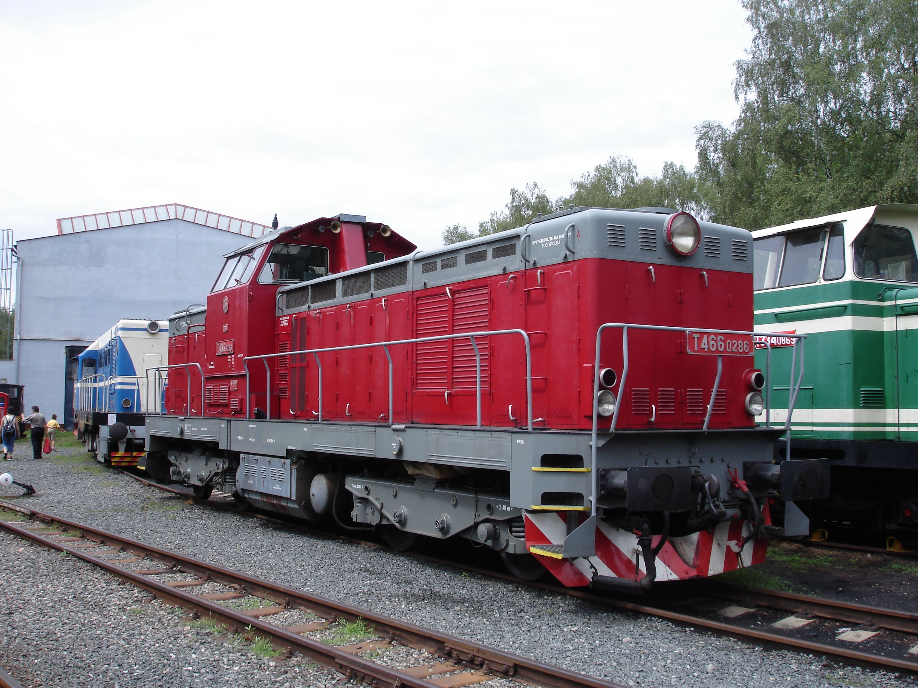 Diesellokomotive T 466.0286 im Eisenbahnmuseum Lužná u Rakovníka